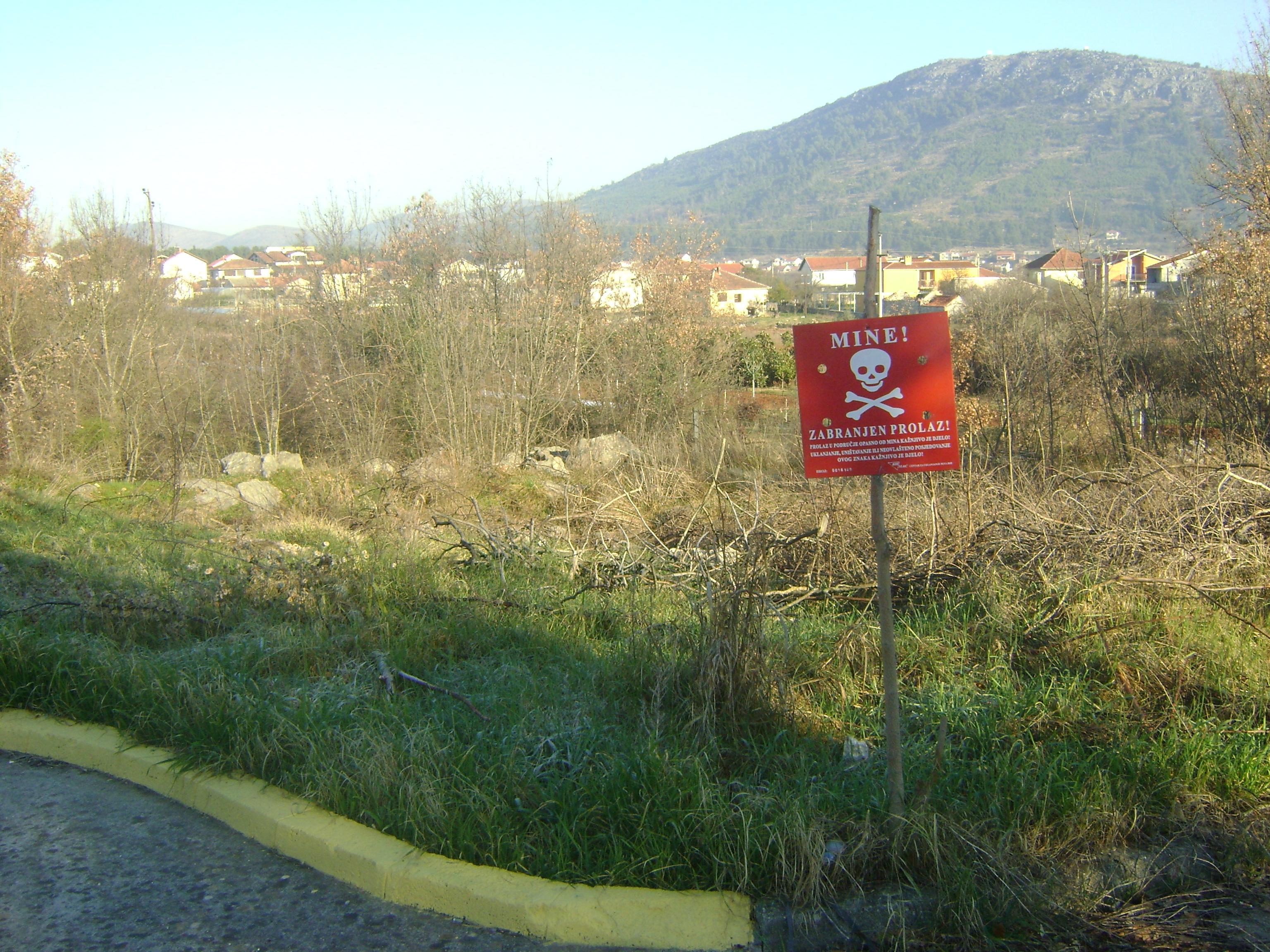 Minenwarntafel in der Herzegowina